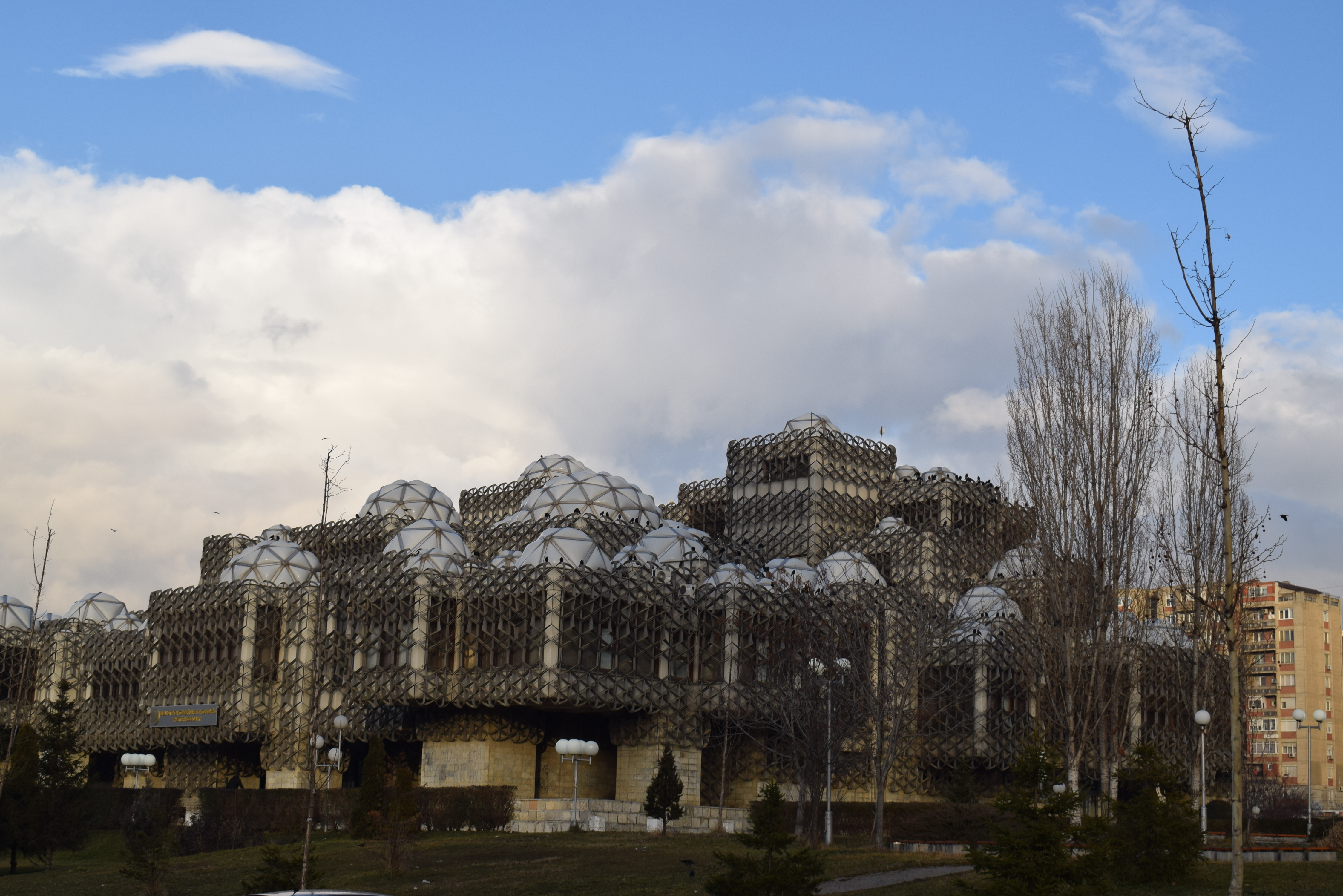 Biblioteka Kombetare e Kosoves